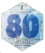 Vignette automobile France 1980